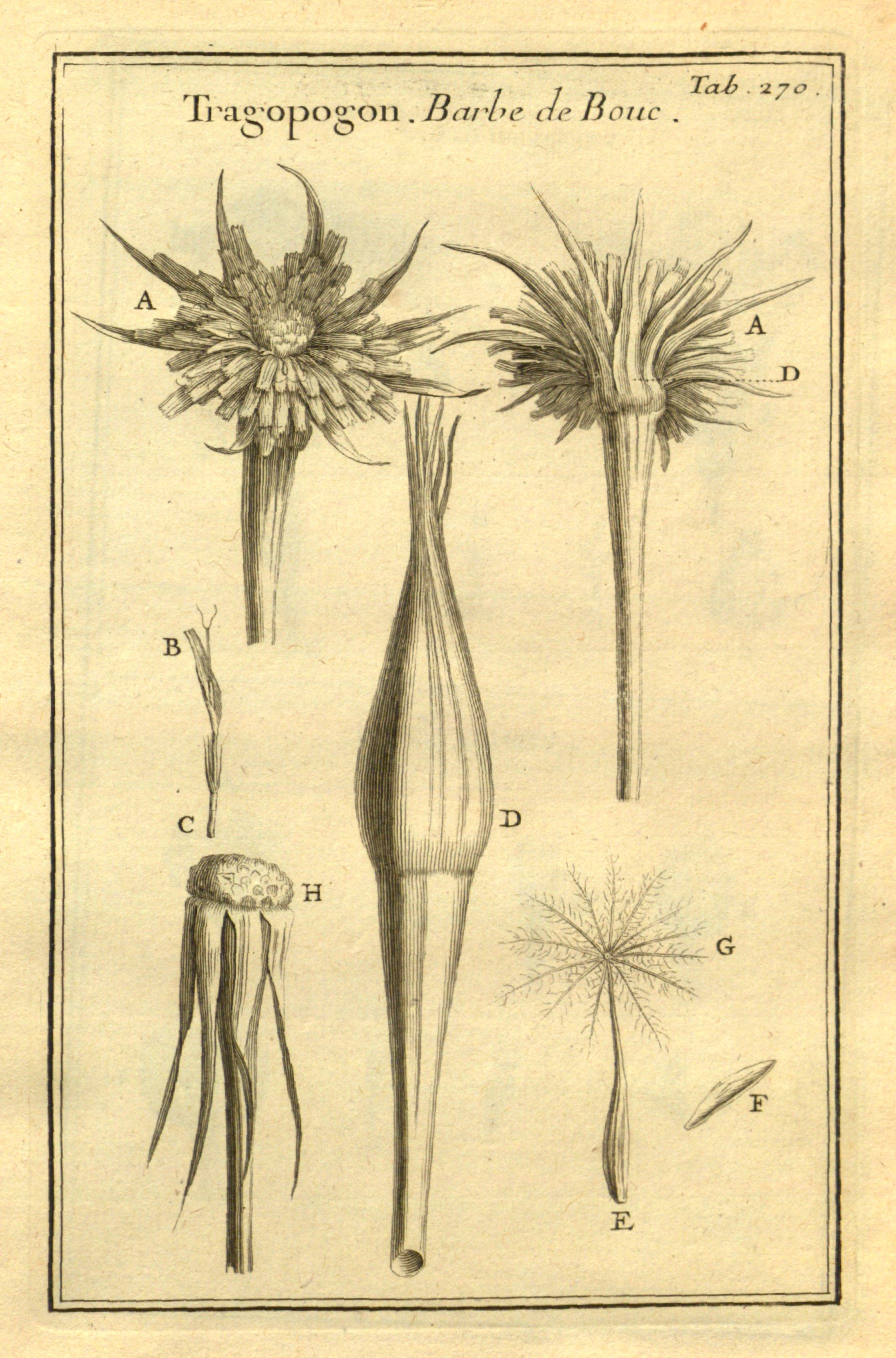 Tragopogon - Ilustración original del creador del género - A: Capítulo: vistas superior e inferior (con indicación de una bráctea involucral); - B-: Lígula; -C:Ovario; - D: Capítulo cerrado; - E y G: Cipsela con su vilano; - F: Semilla; - H: Capítulo post fructificación (receptáculo libre de cipselas).